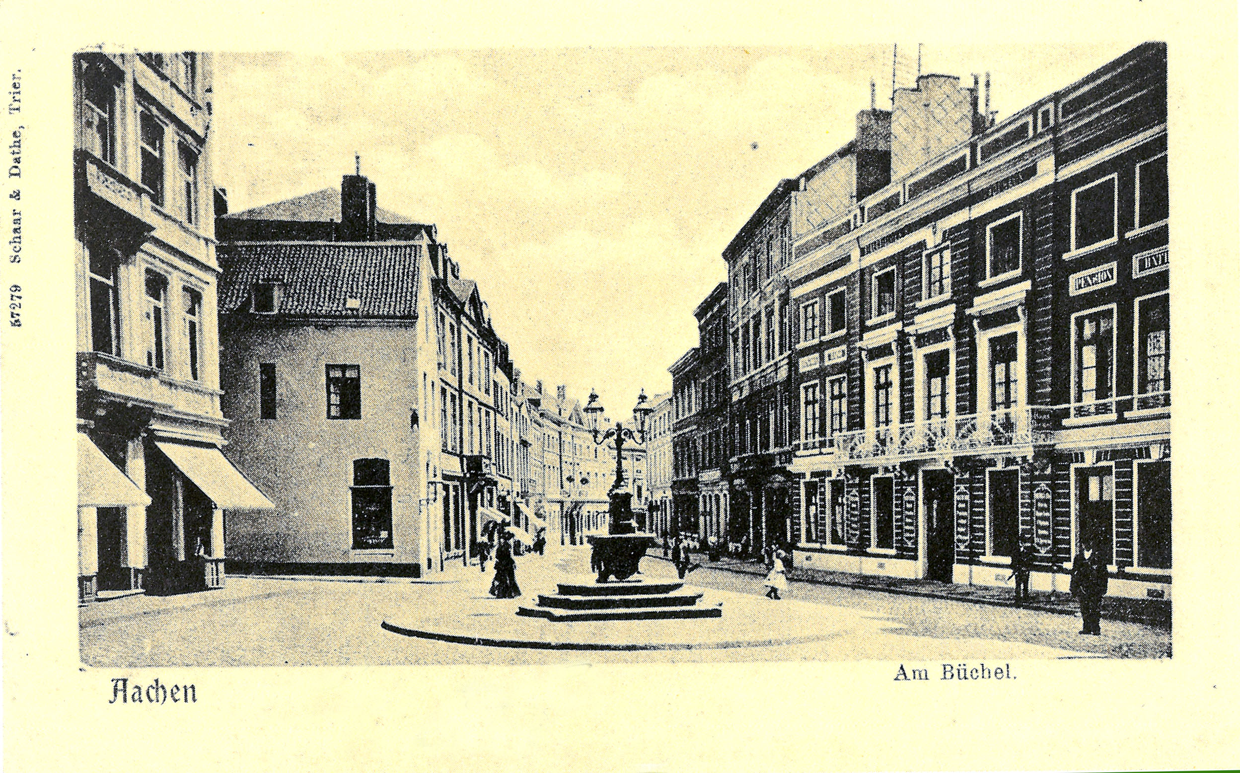 Büchel mit Trinkbrunnen und Neubad (rechts; Architket: Adam Franz Friedrich Leydel), 1903